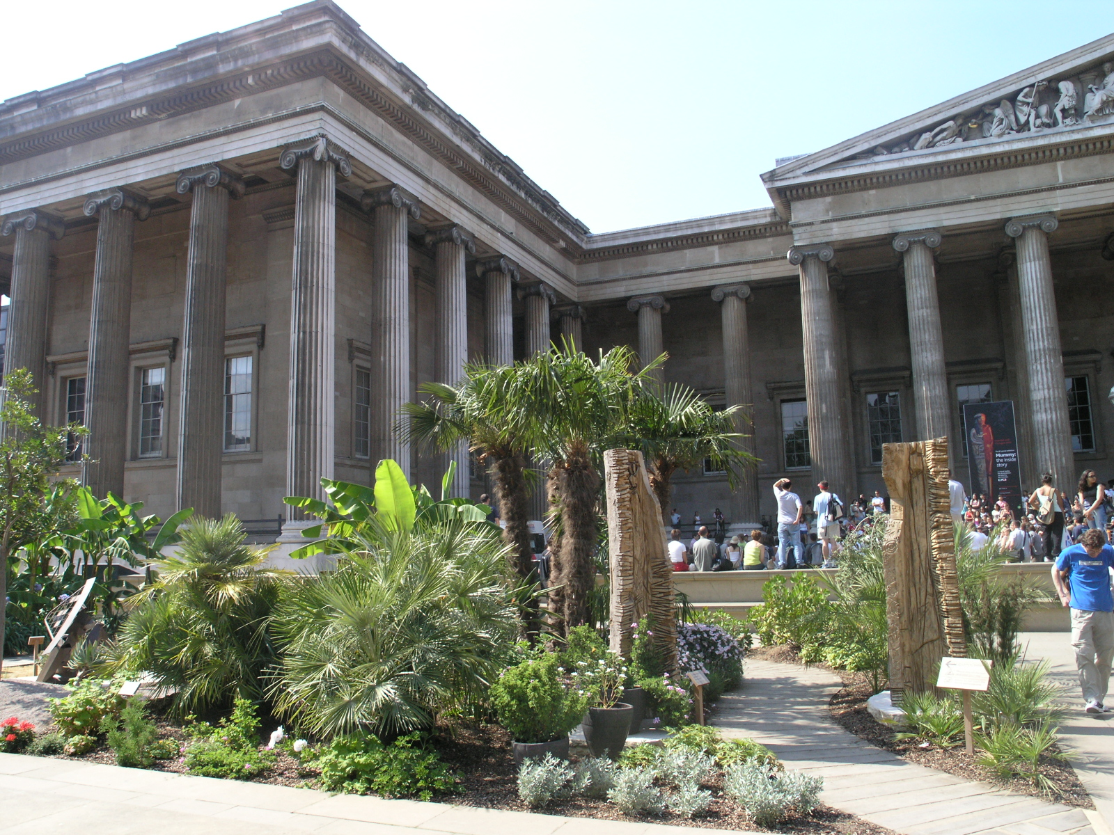 African Garden 2005